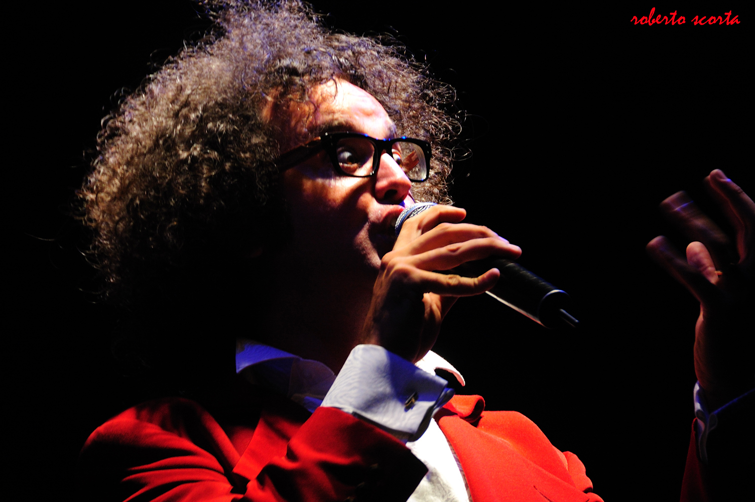 EtruriaEco2010 Simone Cristicchi Simone Cristicchi, concert at Etruria Eco Festival 2010 - Cerveteri - Parco della legnara (22 August 2010)